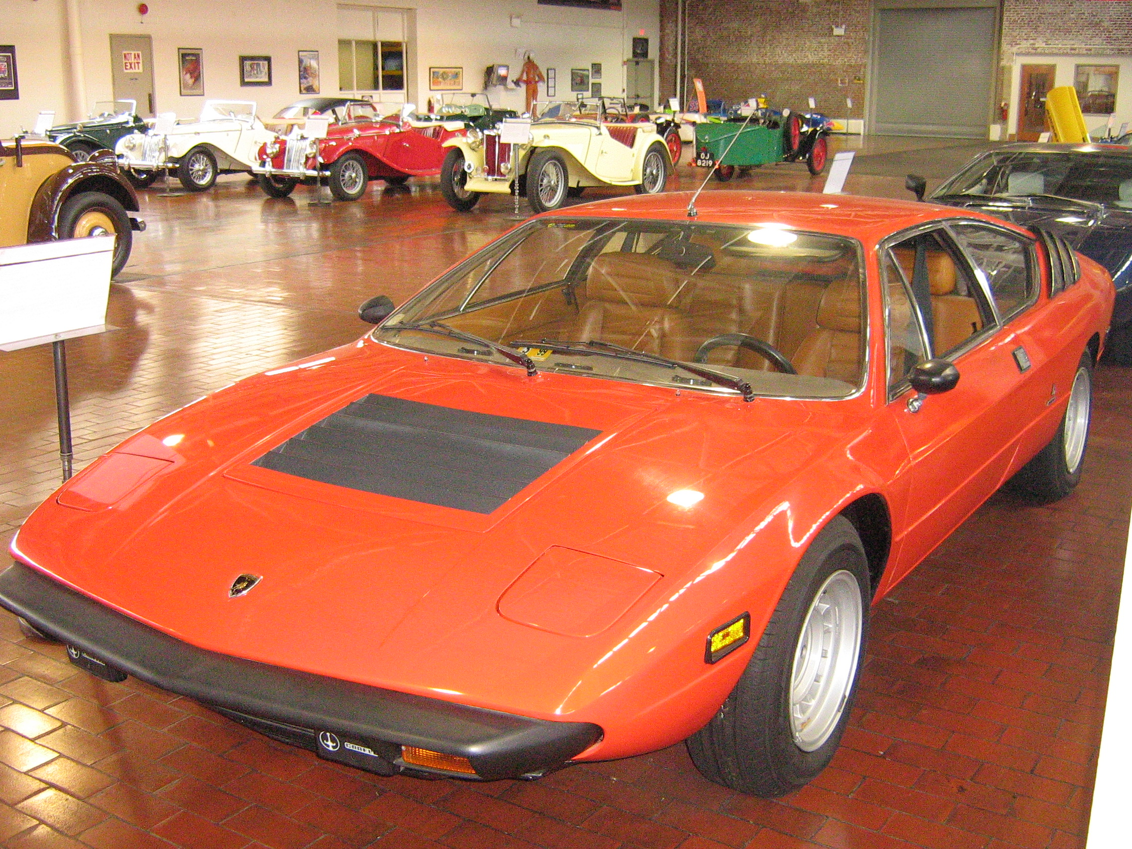 1976 Lamborghini Urraco P300